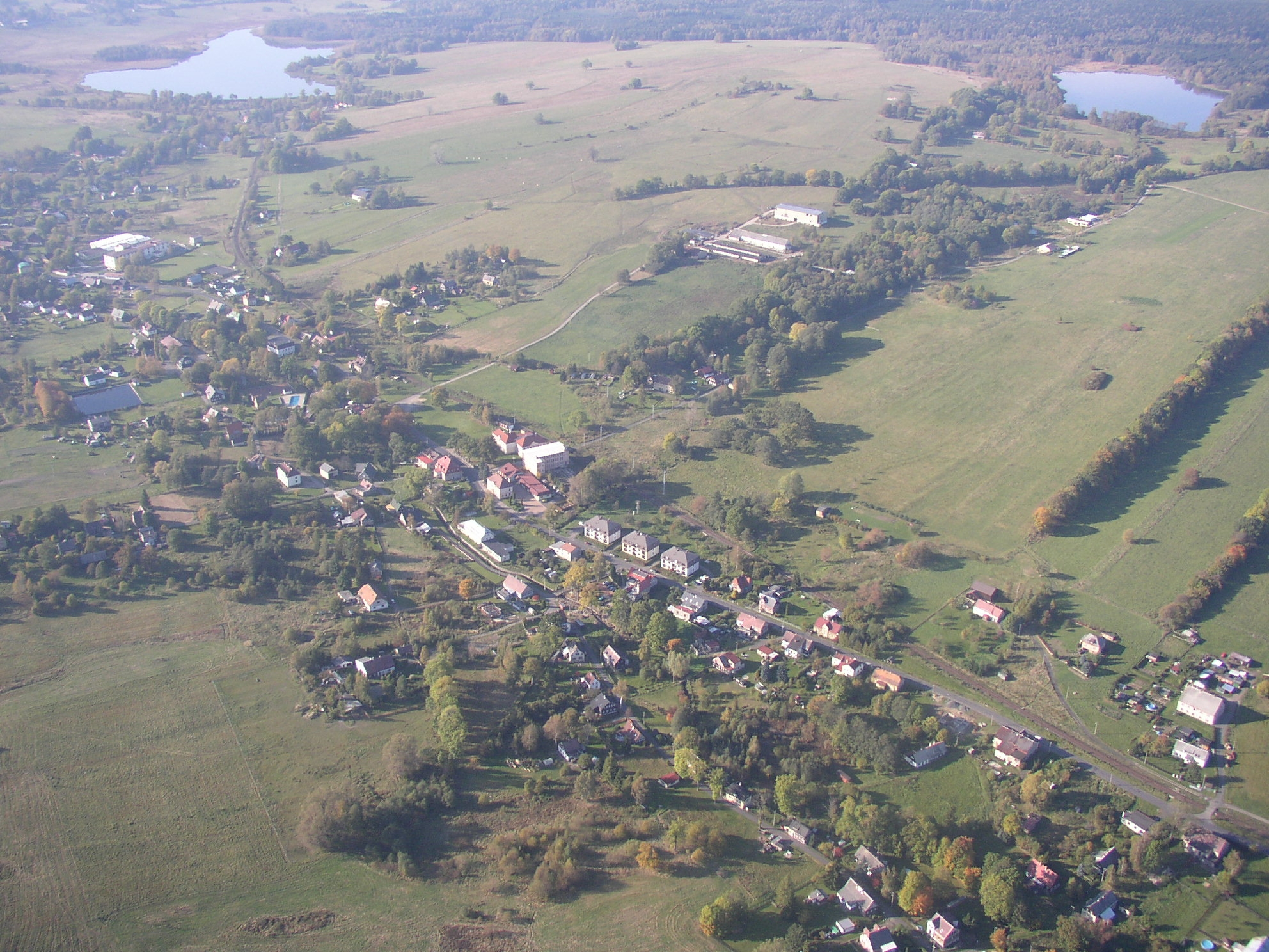 Letecký snímek středu obce Horní Podluží